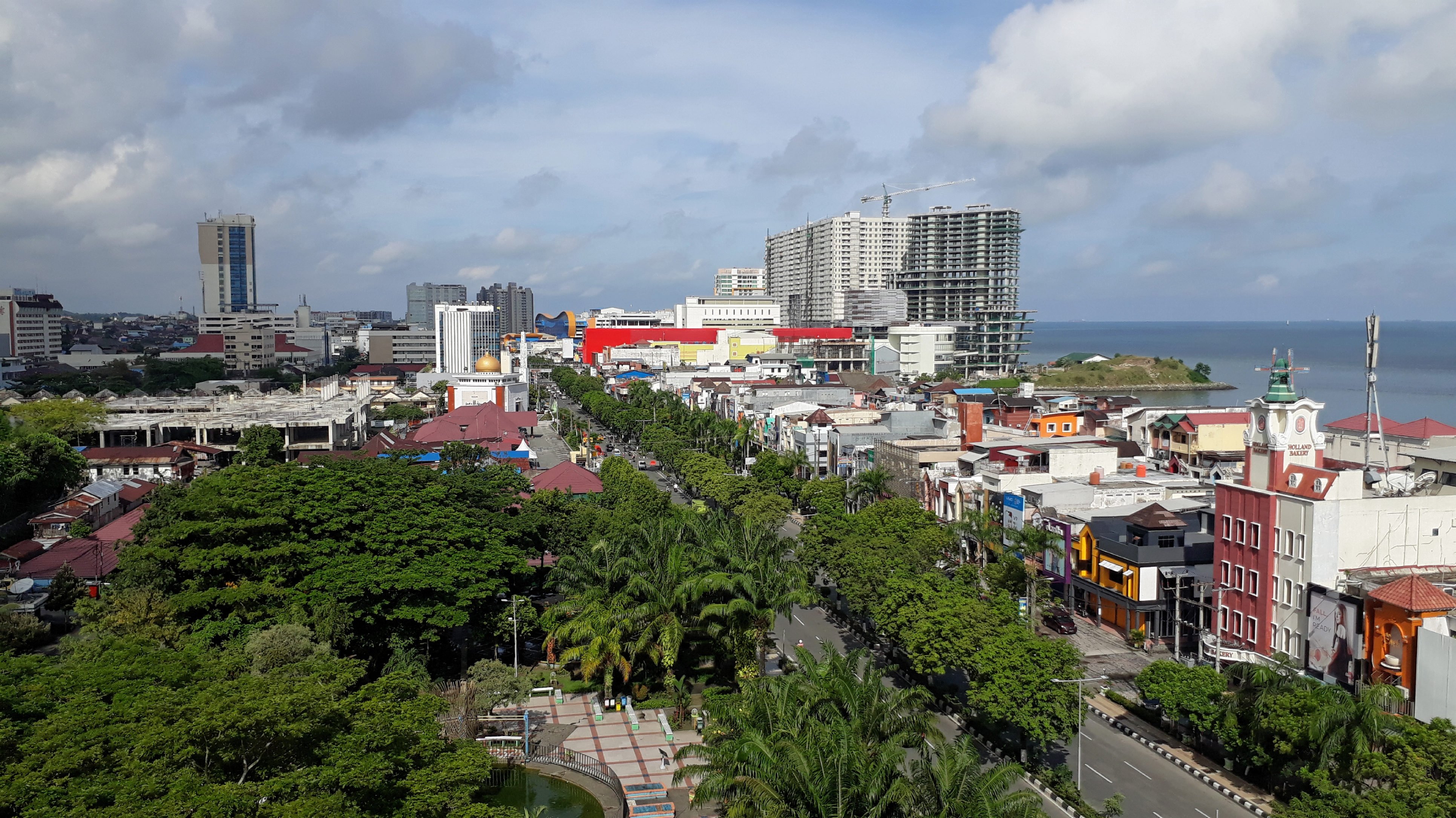 2018-04-16 Balikpapan